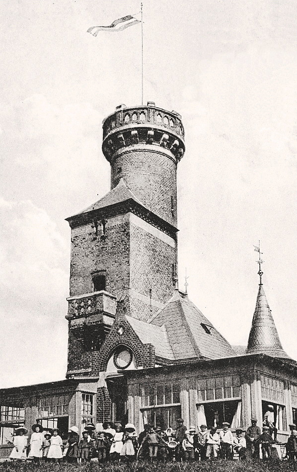 Historisches Bild vom Bismarckturm in Lütjenburg